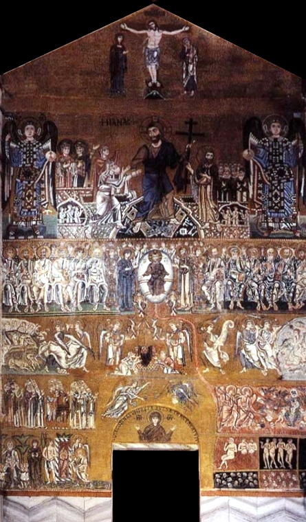 Last judgment. Mosaic in basilica Santa Maria Assunta. Torcello, Venice